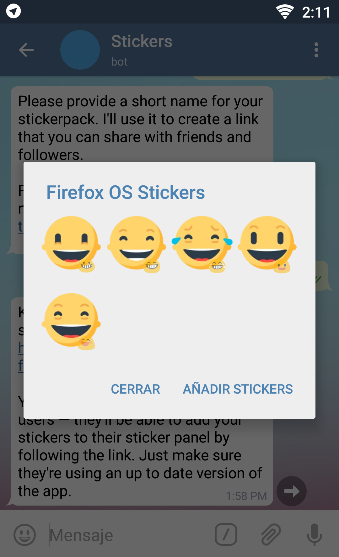 Ejemplo de previsualización de un paquete de stickers después de ser creado en el bot oficial de Telegram (@sticker). Los stickers son usados como complemento de los emoticonos. Nota: Debido a que los stickers oficiales tienen derechos de autor se reemplazó a un paquete con licencia libre (mostrando al set de Firefox OS). Nota 2: La captura creada por Diego Sanguinetti, empleado en un Xperia Z5 con Android 6.0, es para ilustrar parte del manual de Wikilibros. Nota 3: Este es un diálogo es generado por mi cuenta por lo que no tengo ninguna relación con los desarrolladores de Telegram.